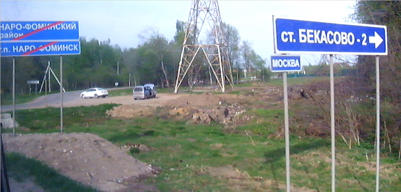 Turn to "station Bekasovo-2" from Kievskoye shosse (M3"Ukraine") when going from Naro-Fominsk. There is no such station now, road leads to Bekasovo-Sortirovochnoe platform and station. New Moscow border is on this point.